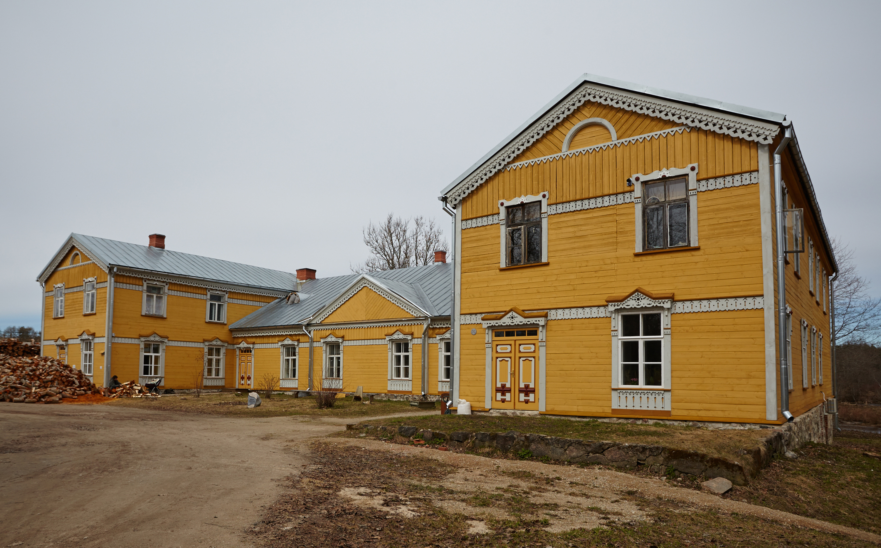 Sänna mõisa peahoone 2013. aasta aprillis.